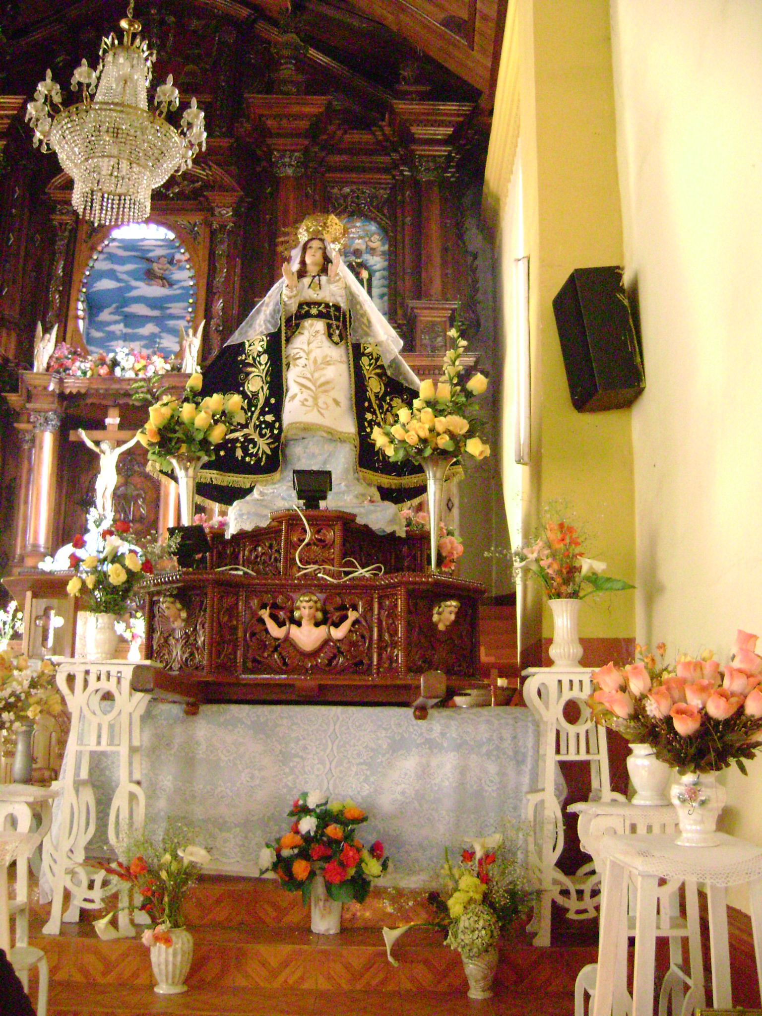 Virgen de La Asunción